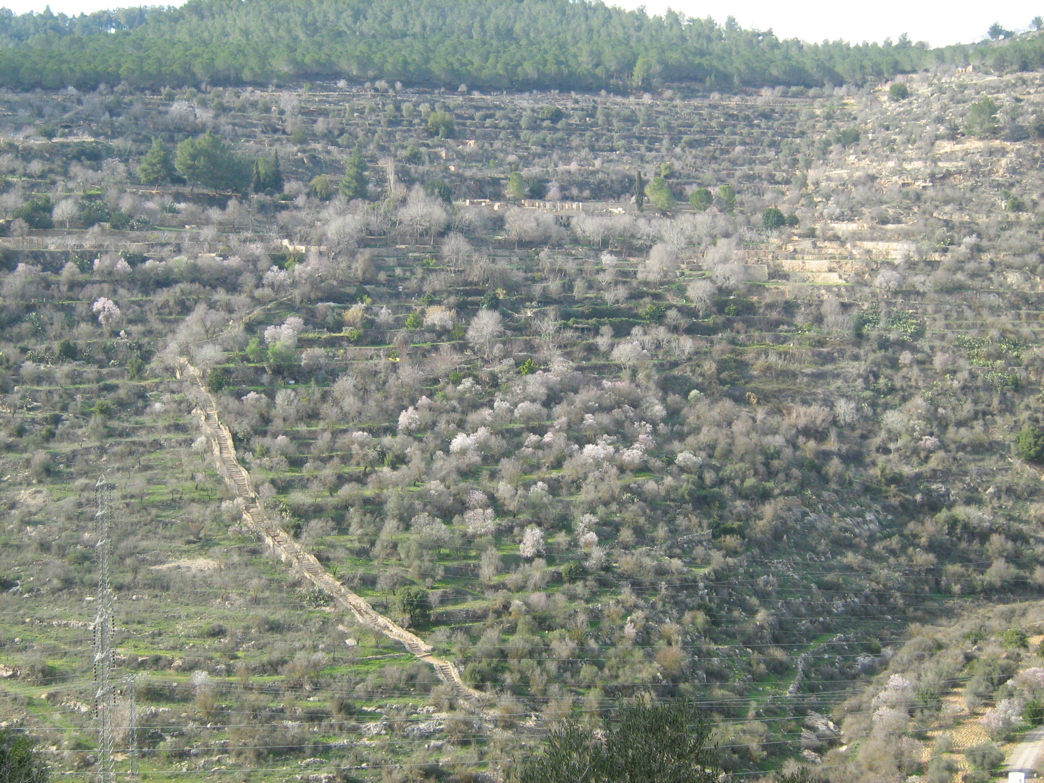 שקדיות בסטף